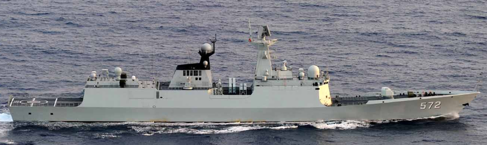 ３月３０日（土）午前７時頃、海上自衛隊第５航空群所属「Ｐ－３Ｃ」（那覇）が、沖縄本島の南西約６４０ｋｍの太平洋上を東進する中国海軍ルーヤンⅡ級ミサイル駆逐艦１隻、ジャンカイⅡ級フリゲート２隻及びユージャオ級揚陸艦１隻の合計４隻を確認した。